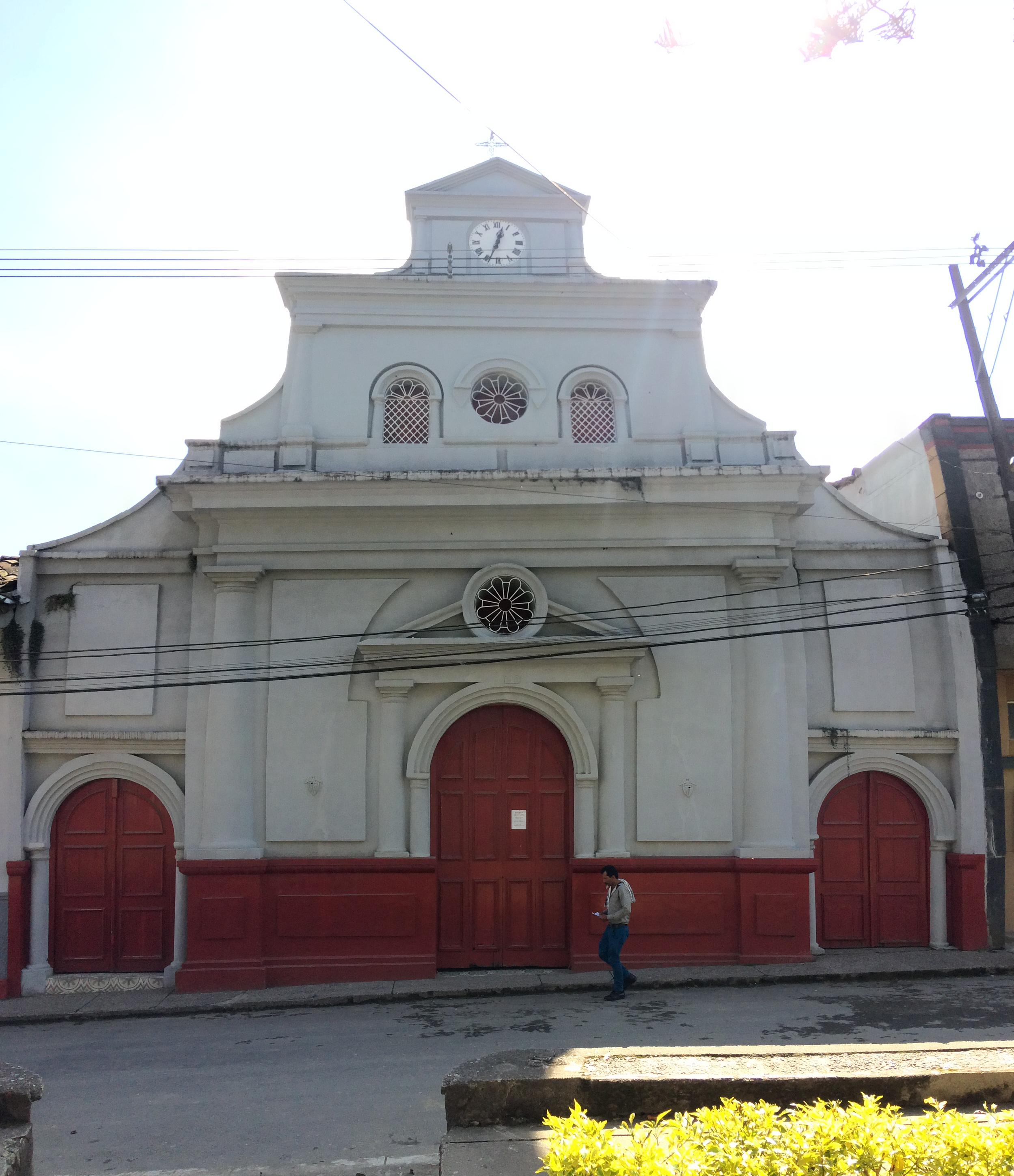 Frontis del Santuario de Nuestra Señora de Valvanera (Sonsón, Colombia)